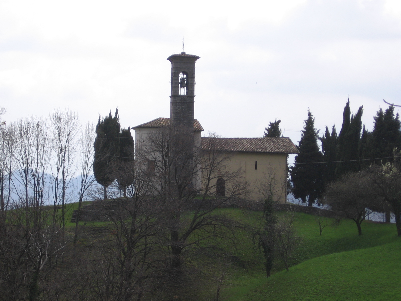 Bianzano, Bergamo, Italia